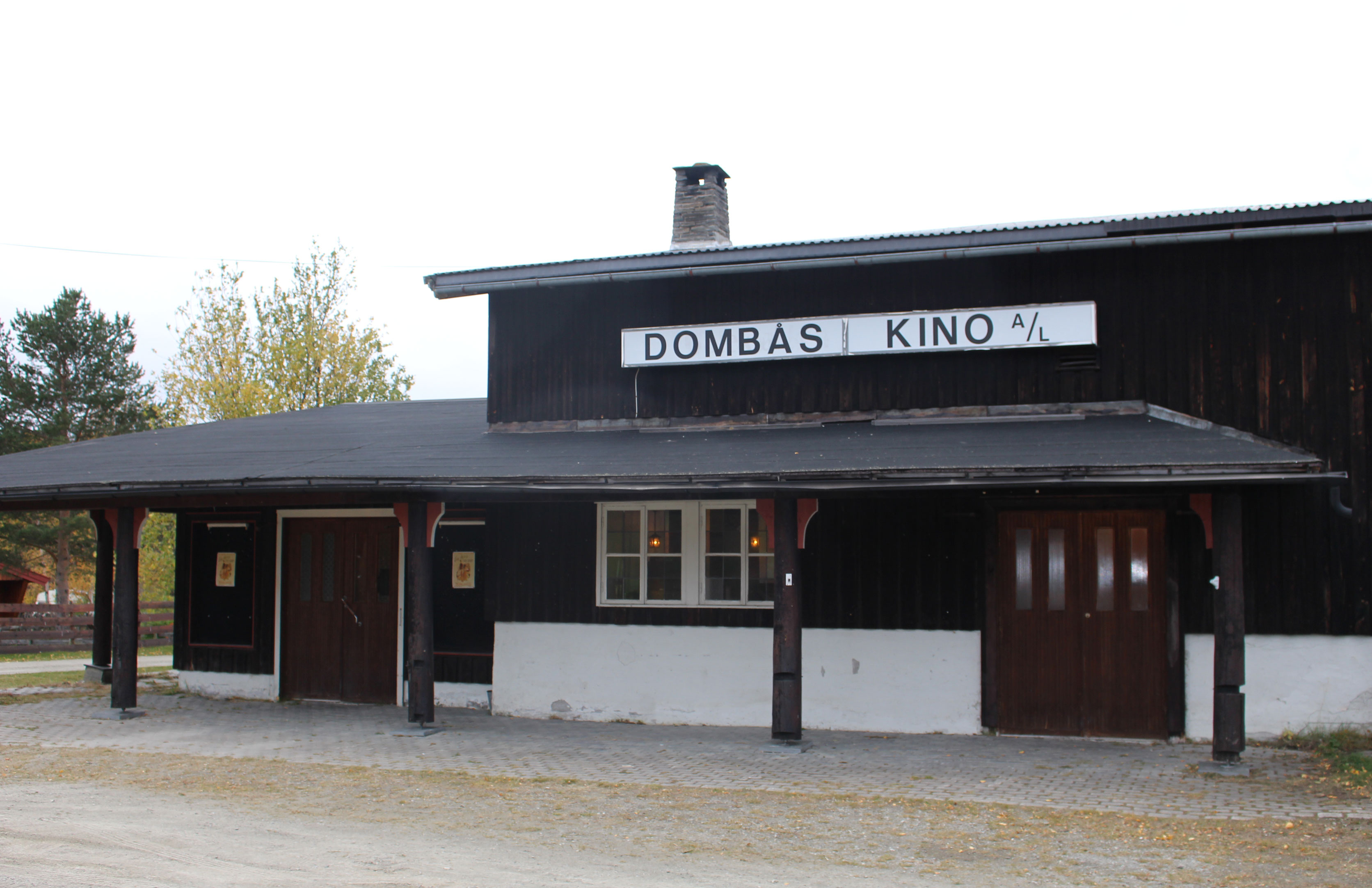 Dombås kino, Oppland.